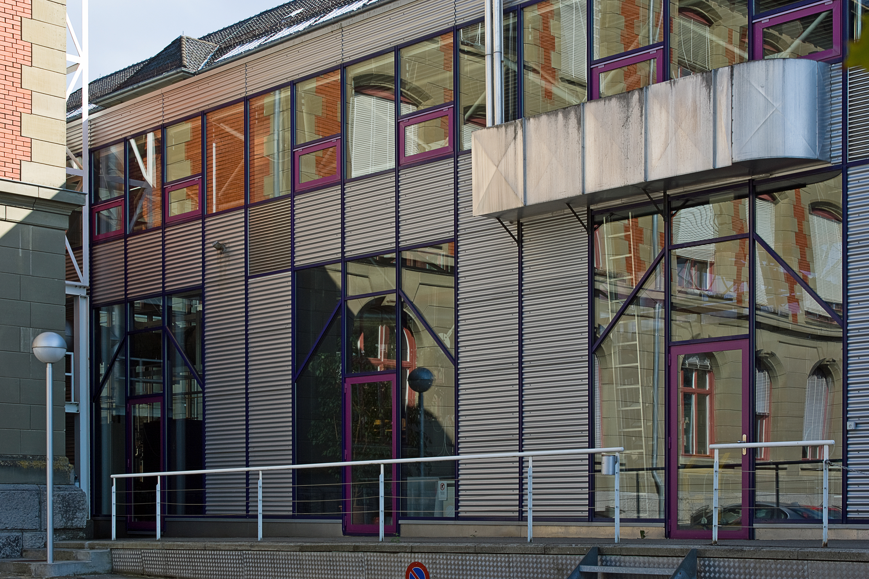 Kantonales Technikum, heute Berner Fachhochschule, spiegelt sich im Neubau